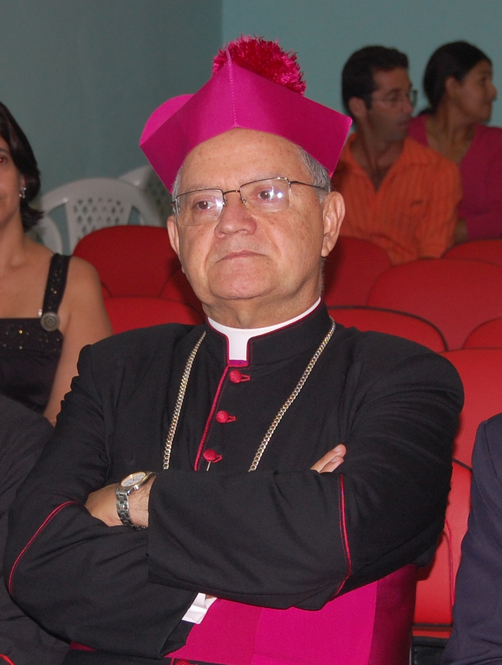 Em conferencia.